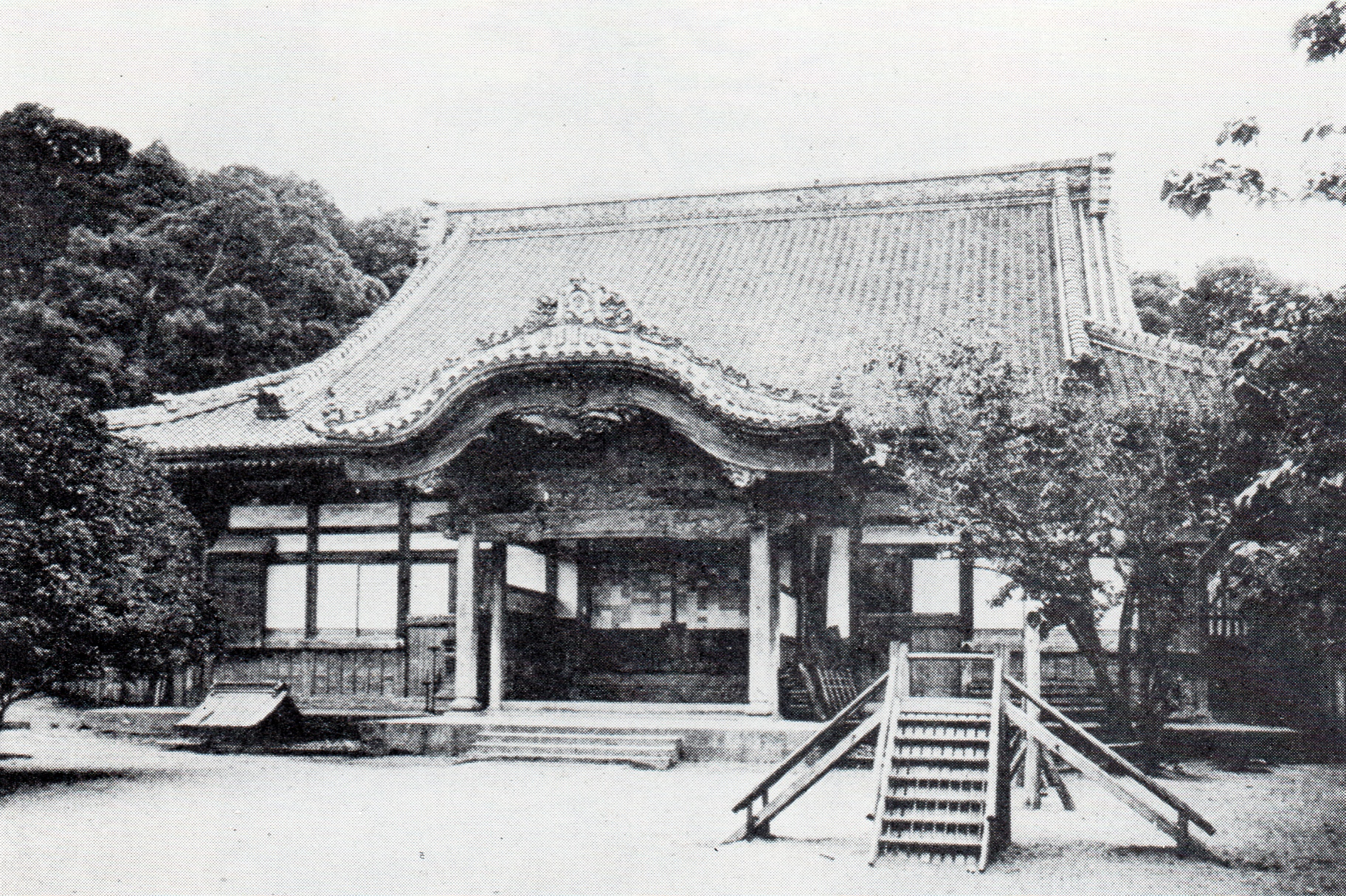 享禄3年6月に完工した龍海院。戦災により焼失。